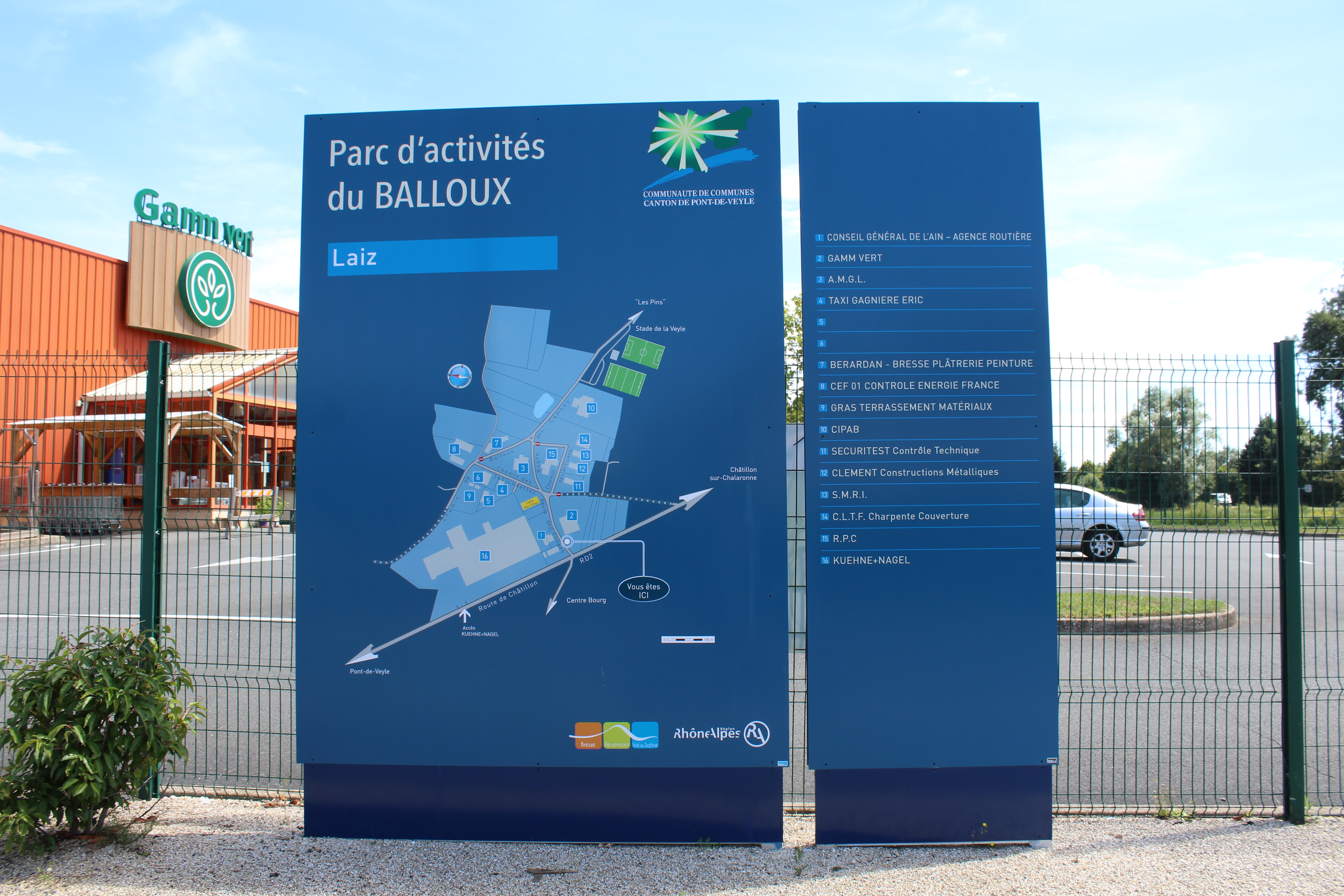 Panneau du plan du parc d'activités du Balloux à Laiz.